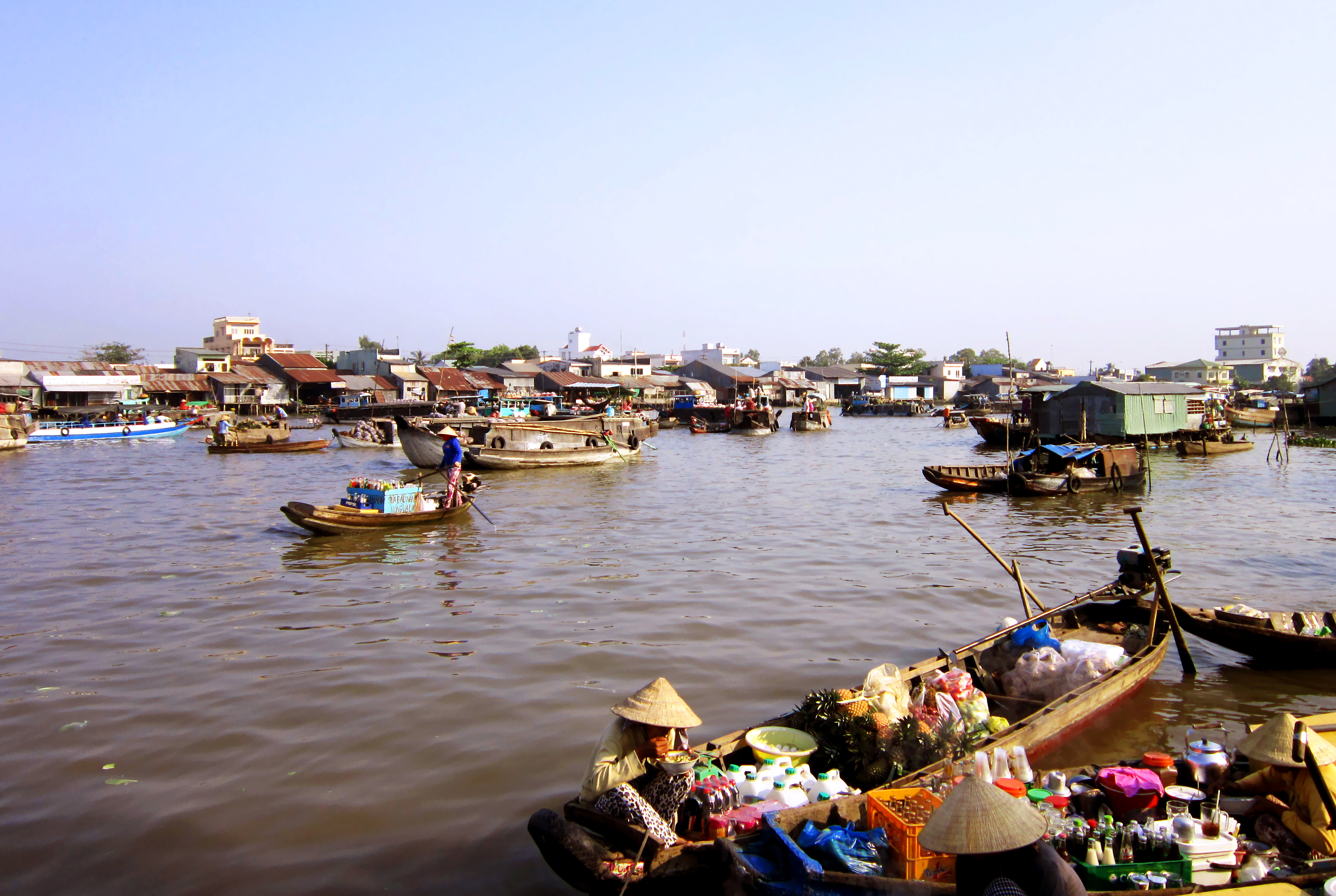 Một cảnh ở chợ nổi Cái Răng, thuộc quận Cái Răng, thành phố Cần Thơ, Việt Nam.